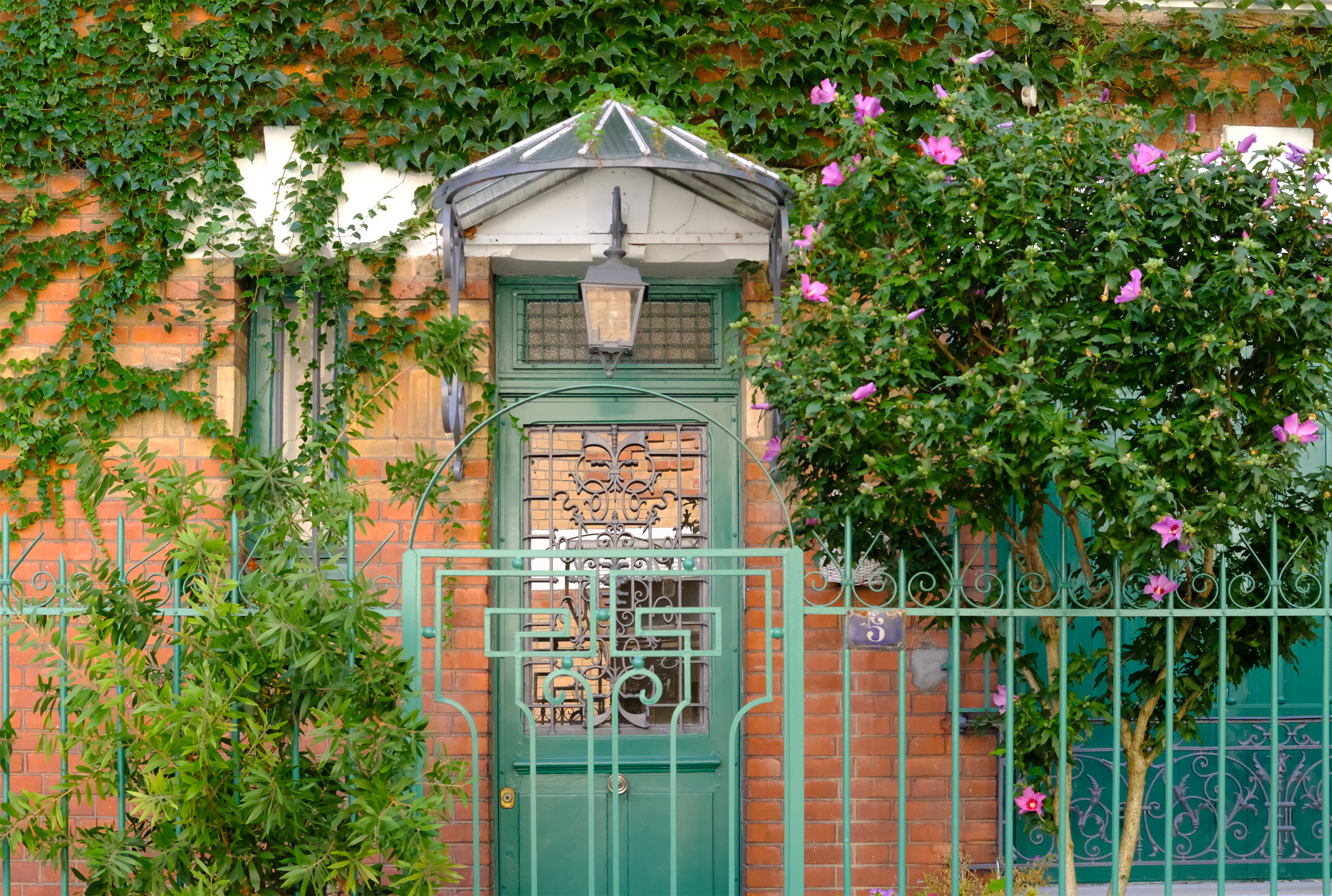 Cité florale (rue des Liserons, n°5) - Paris XIII